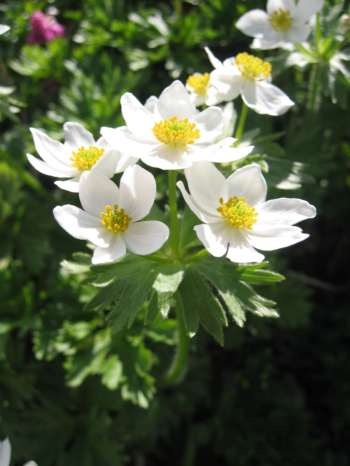 ハクサンイチゲ